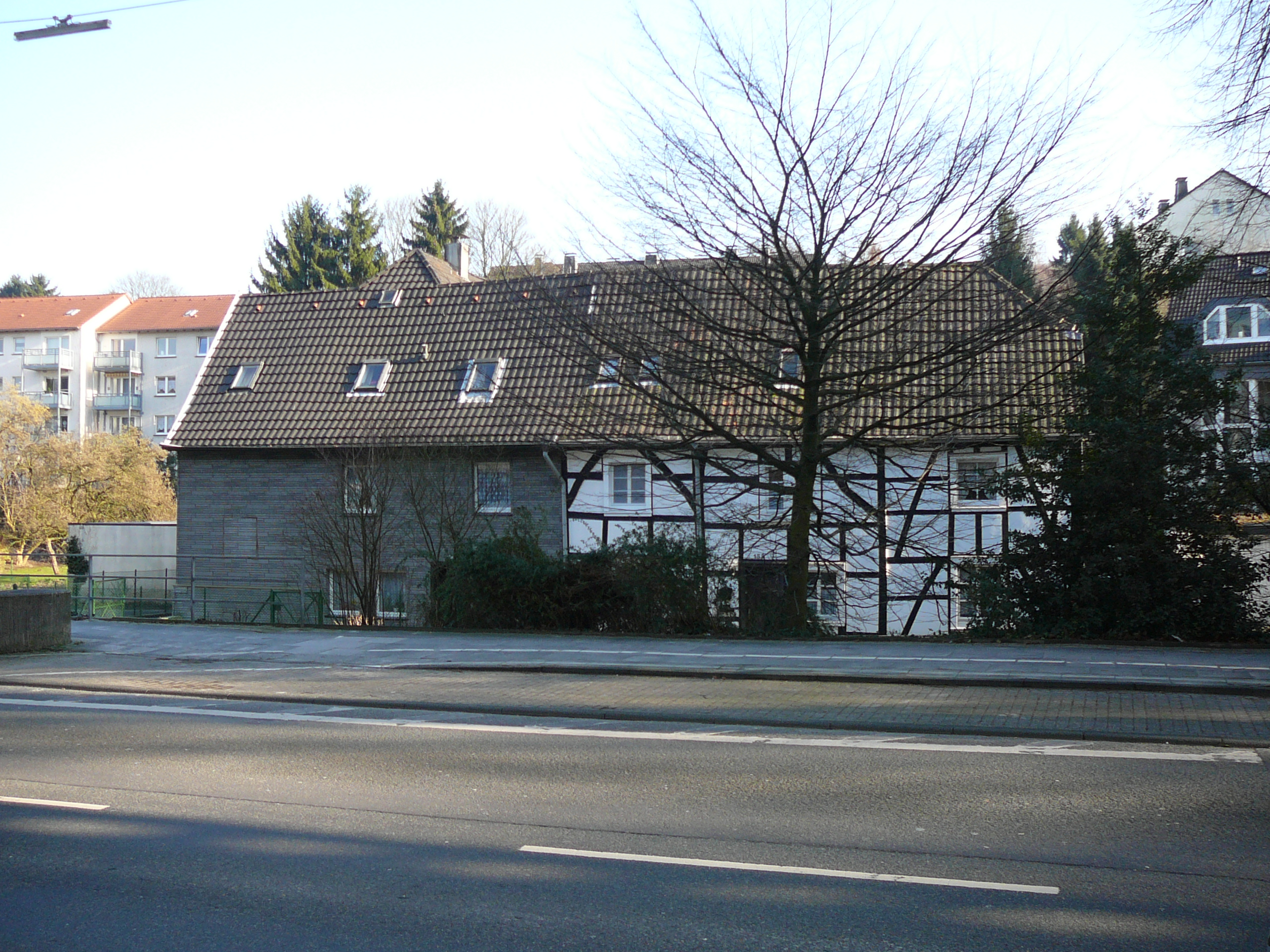 Kaiserstraße, Wuppertal